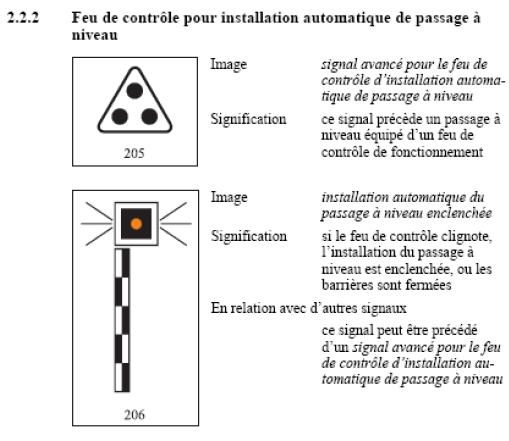 Feux de contrôle pour train à l'approche d'un passage à niveau suisse